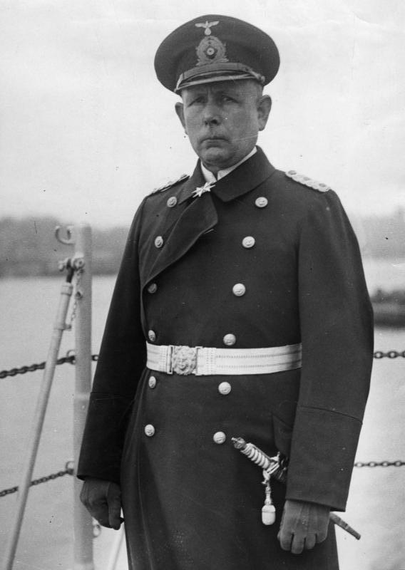 Wilhelm Marschall Indienststellung des Panzerschiffs "Admiral Scheer" in Wilhelmshaven. Der Kommandant des Schiffes Kpt.z.See [Wilhelm] Marschall. [Indienststellung der "Admiral Scheer" am 12.11.1934 Kommandant Kpt.z.See Wilhelm Marschall von 11. November 1934 – 21. September, 1936.] Abgebildete Personen: Marschall, Wilhelm: Generaladmiral (hier als Kpt.z.See), Oberbefehlshaber des Marine-Gruppenkommandos West, Deutschland. GND 102224102